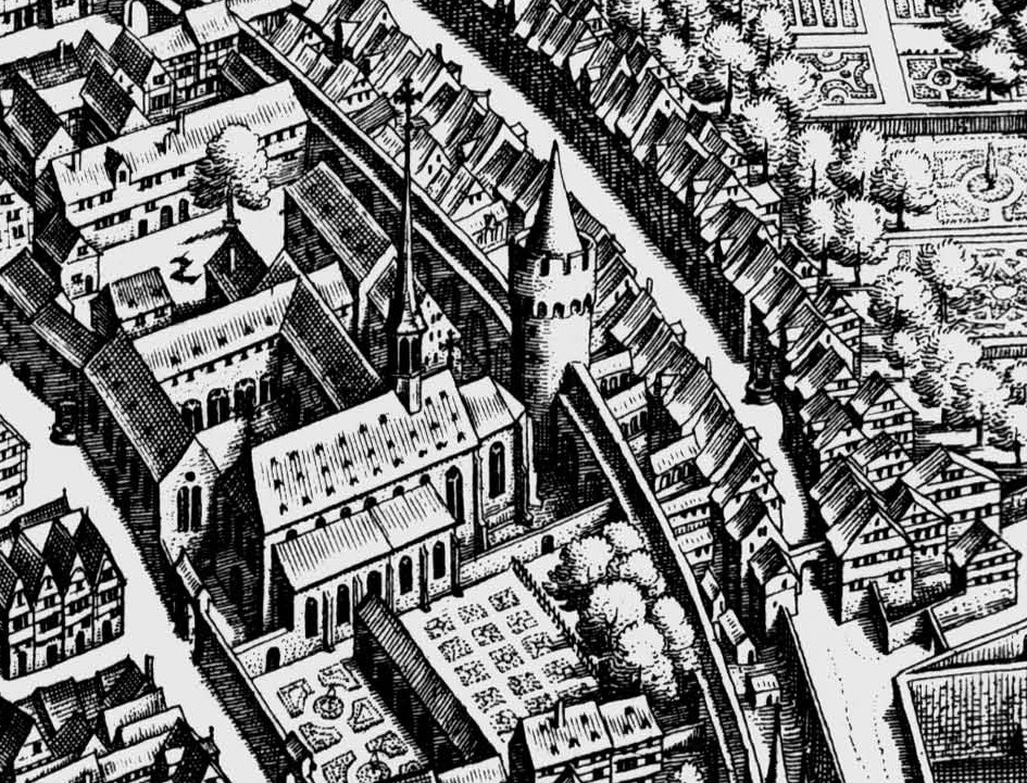 Klostergasse, Dominikanerkloster, Staufenmauer, Mönchsturm und Judengasse in Frankfurt am Main.